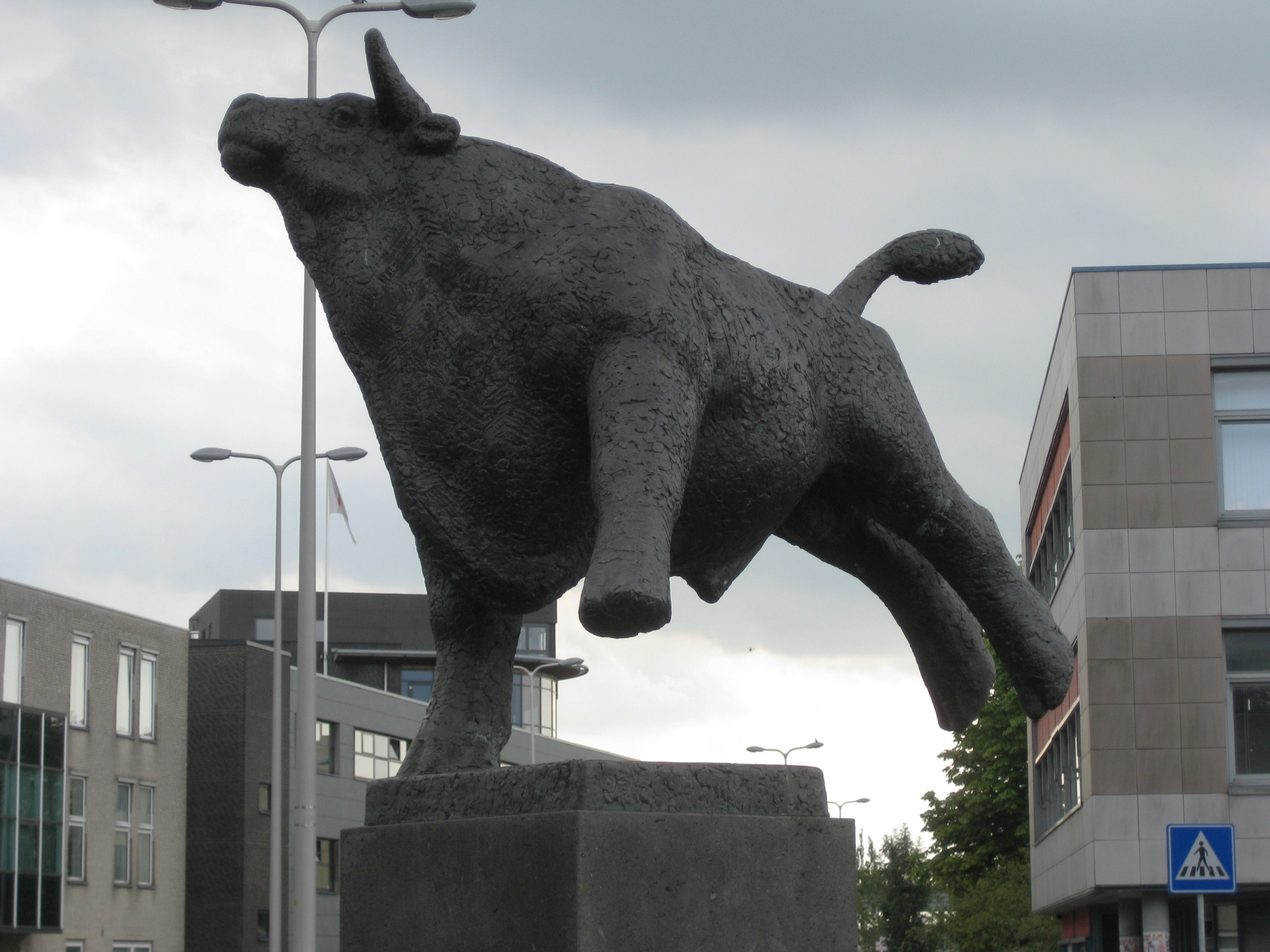 "Stier", Prins Bernhardlaan/Hoflaan in Alphen aan den Rijn. 1986 Kunstenaar Pieter d'Hont